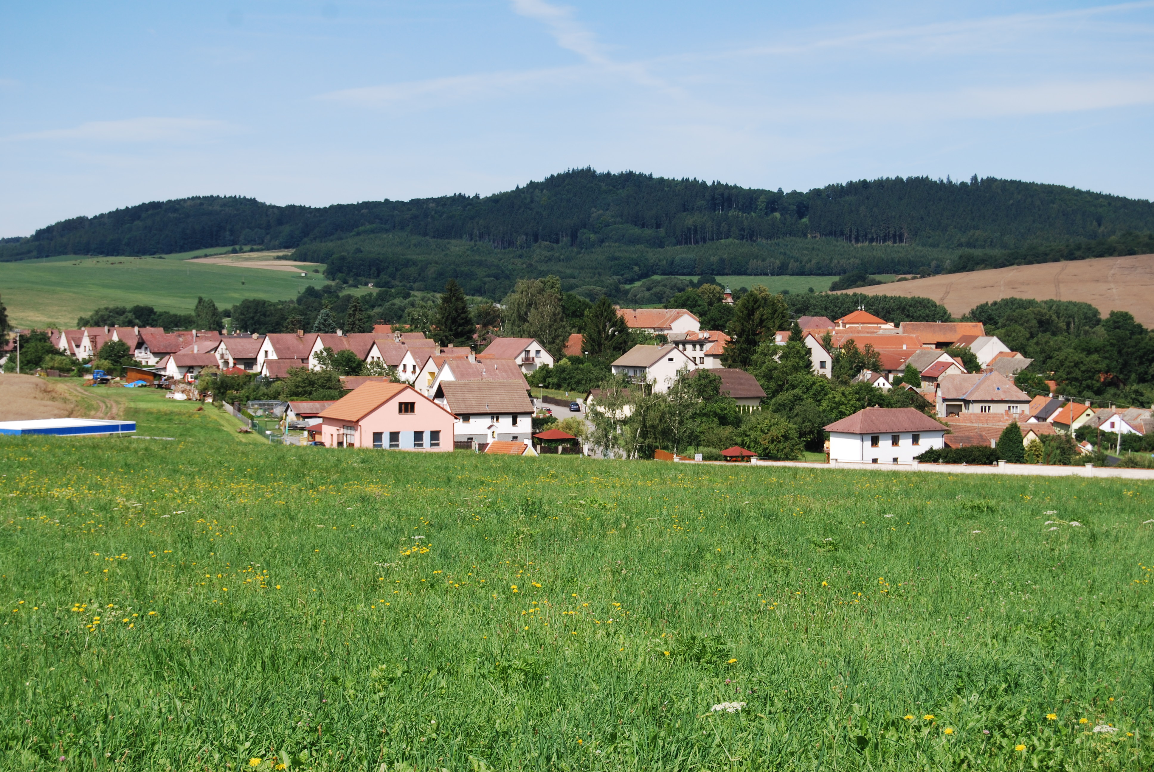 Pohled na obec od památníku bitvy u Jankova. Obec Jankov v okrese Benešov, kraj Středočeský. Česká republika.